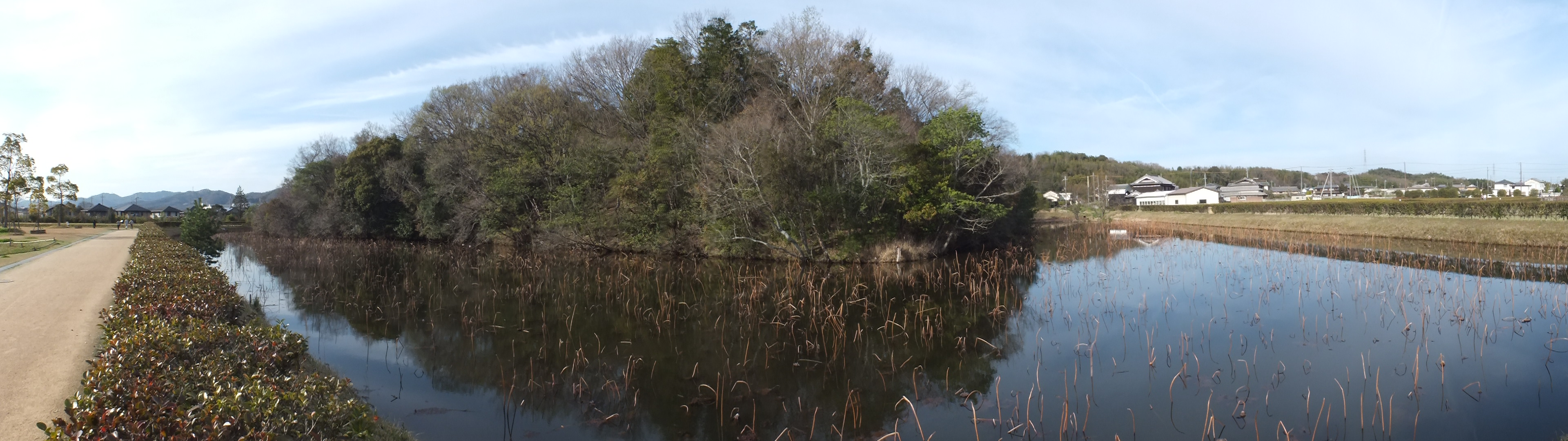 Kasai Tamaoka Historic Park 玉丘史跡公園